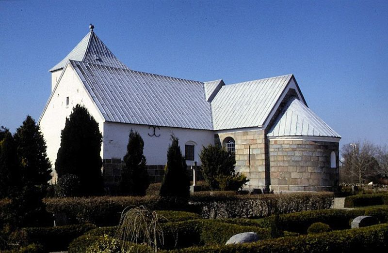 Rybjerg Kirke, (Skive Kommune), set fra sydøst